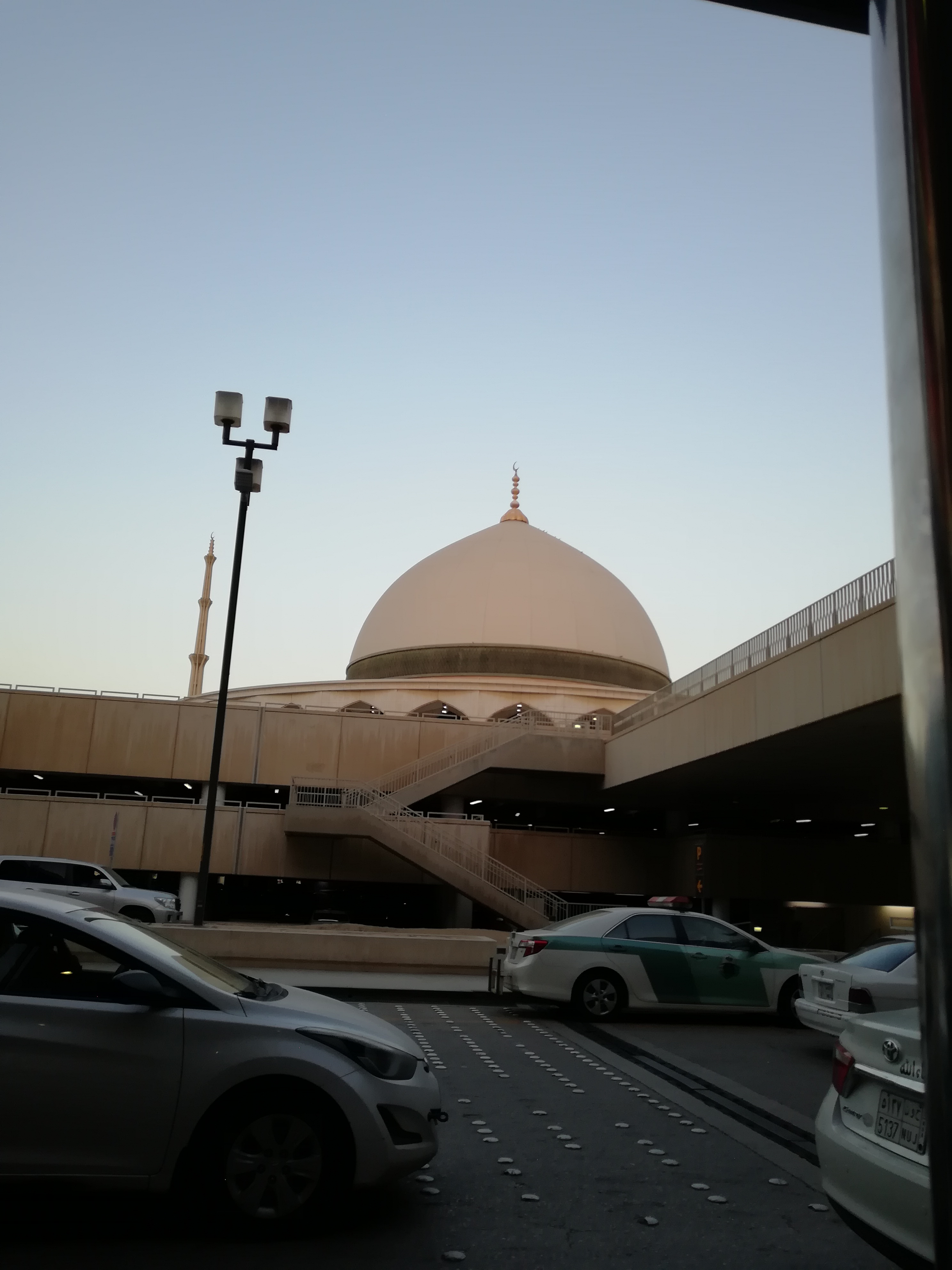 Dammam